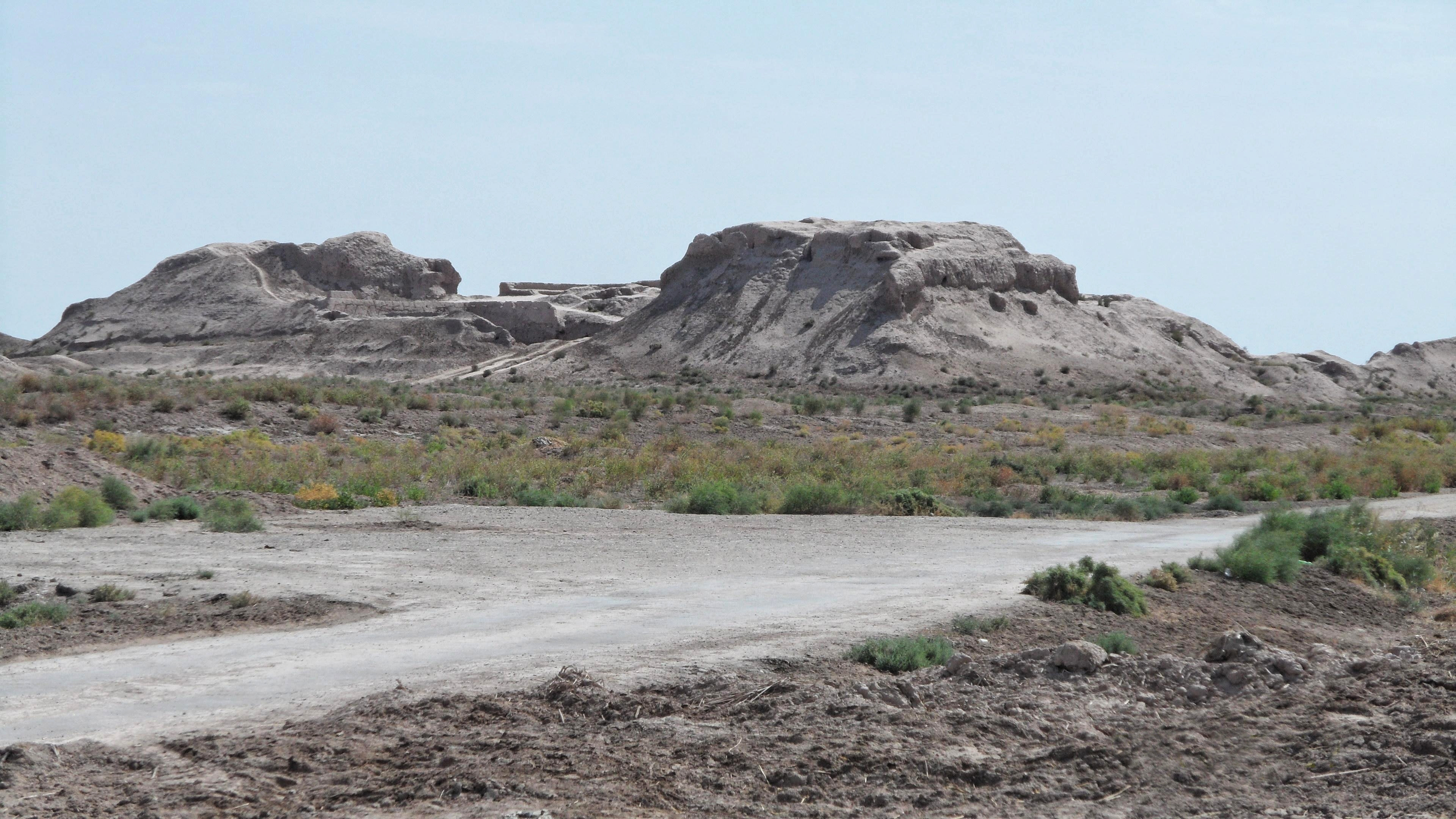 Toprak Kale - Festung aus der Kuschanenzeit in Choresm